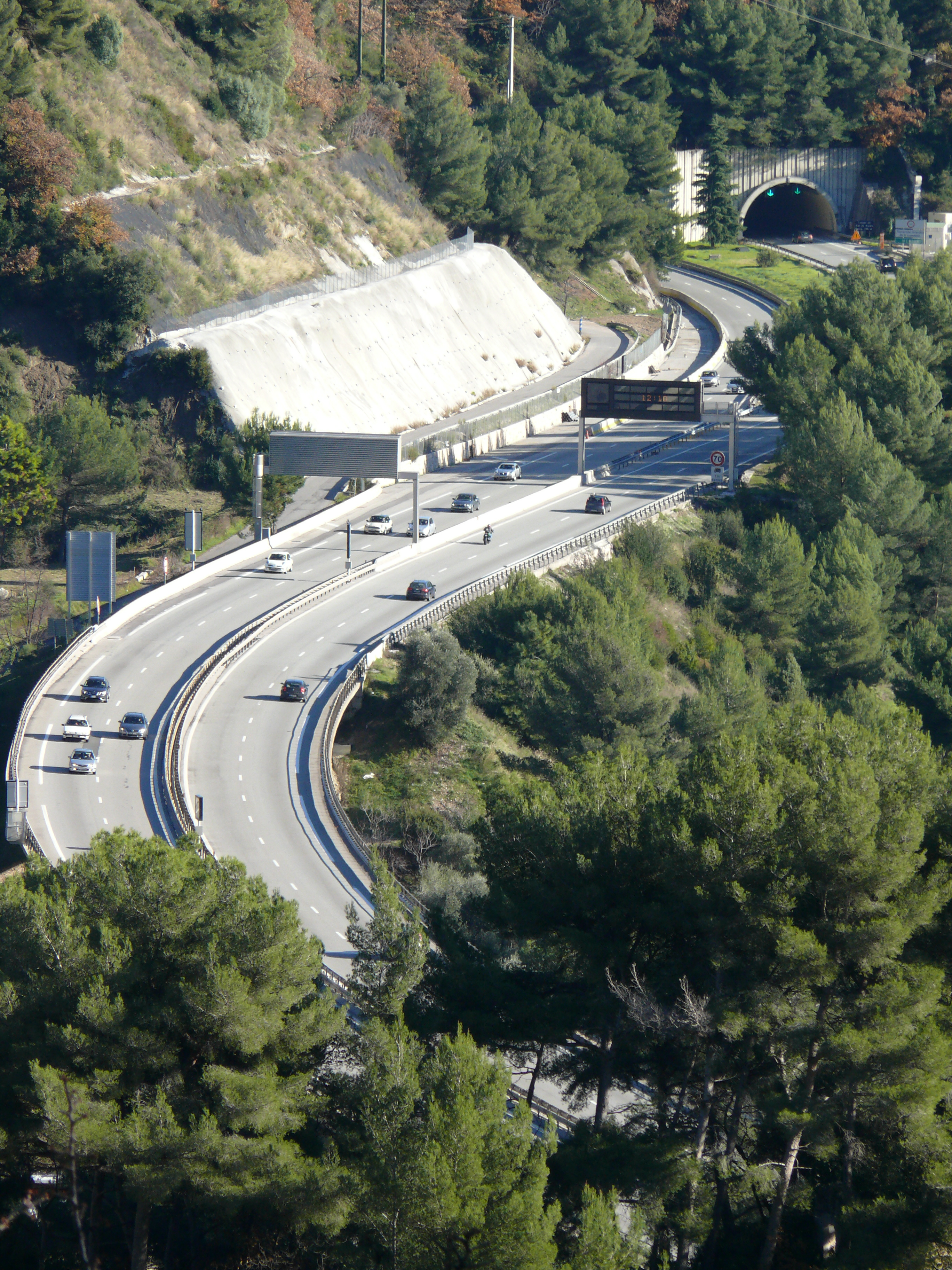 Autoroute française A8 près de Gorbio, de viaduc en tunnel